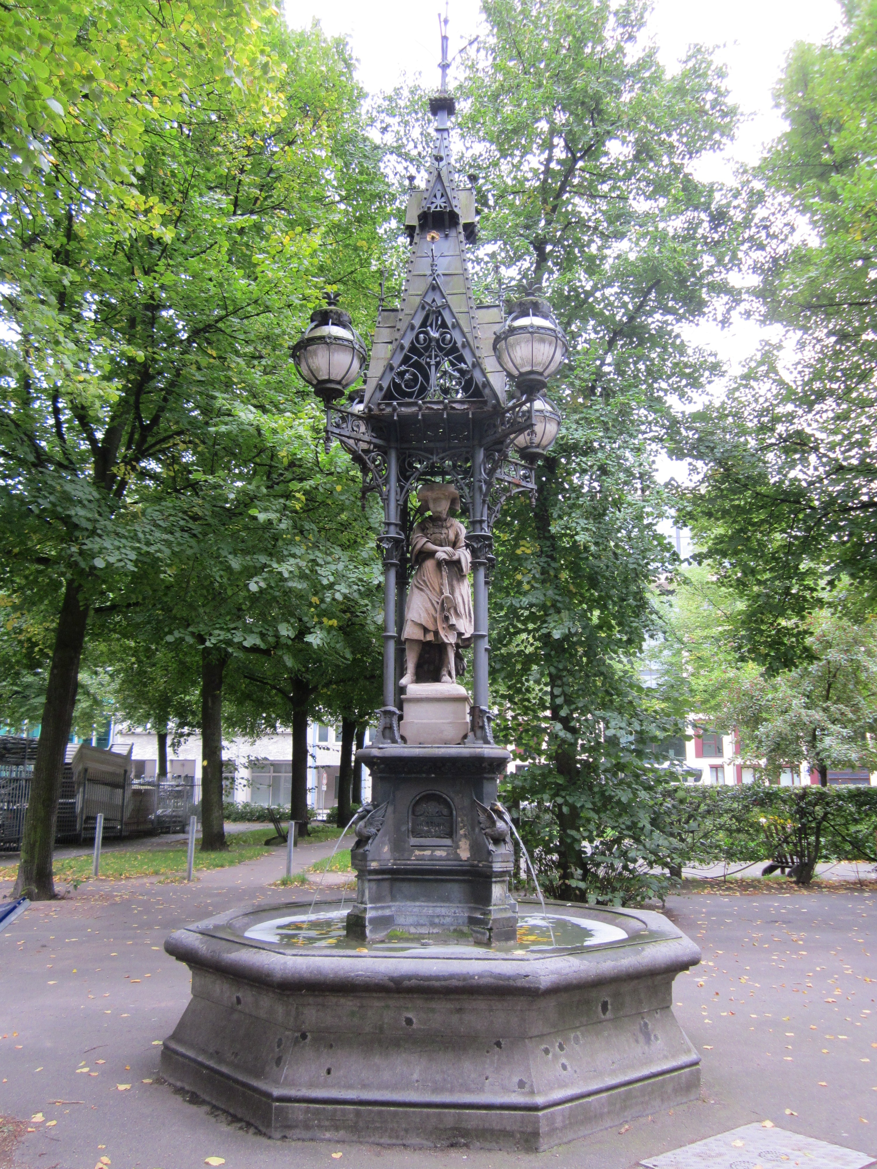 Der Vierländerin-Brunnen, stellt eine Vierländer Bäuerin mit Marktkorb unter einem neogotischen Dächlein dar. Er wurde 1878 von Engelbert Peiffer geschaffen und auf dem damaligen Großmarkt am Meßberg aufgestellt. Später auf dem Großmarkt an der Amsinckstraße aufgestellt, wurde er 1975 auf den Hopfenmarkt in der Hamburger Altstadt versetzt.